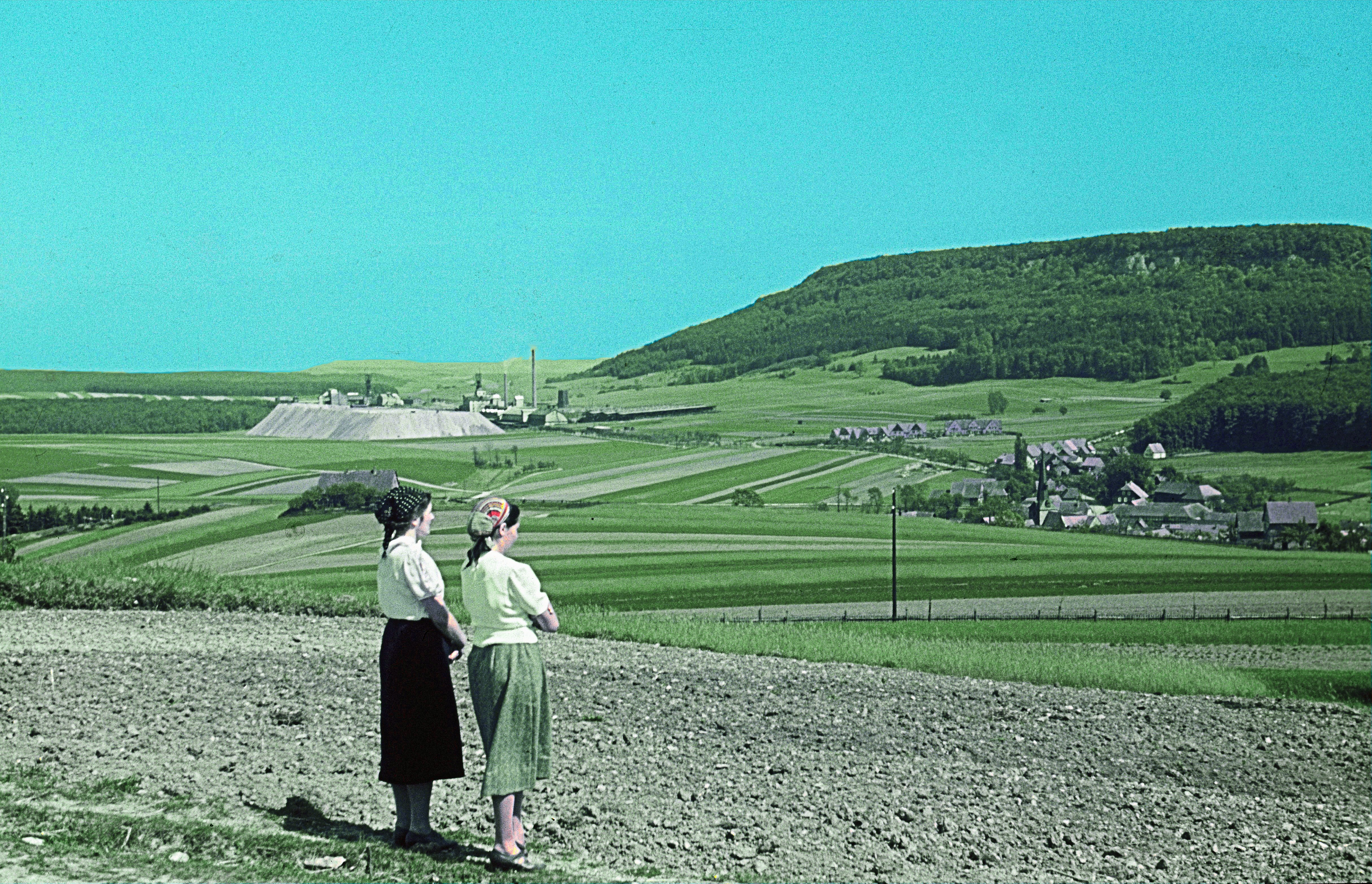 Kalibergwerk_Bischofferode_und_der_Ort_Holungen im Eichsfeld (1942), die Felsformationen oben an der Bergkante wird "Wilde Kirche" genannt